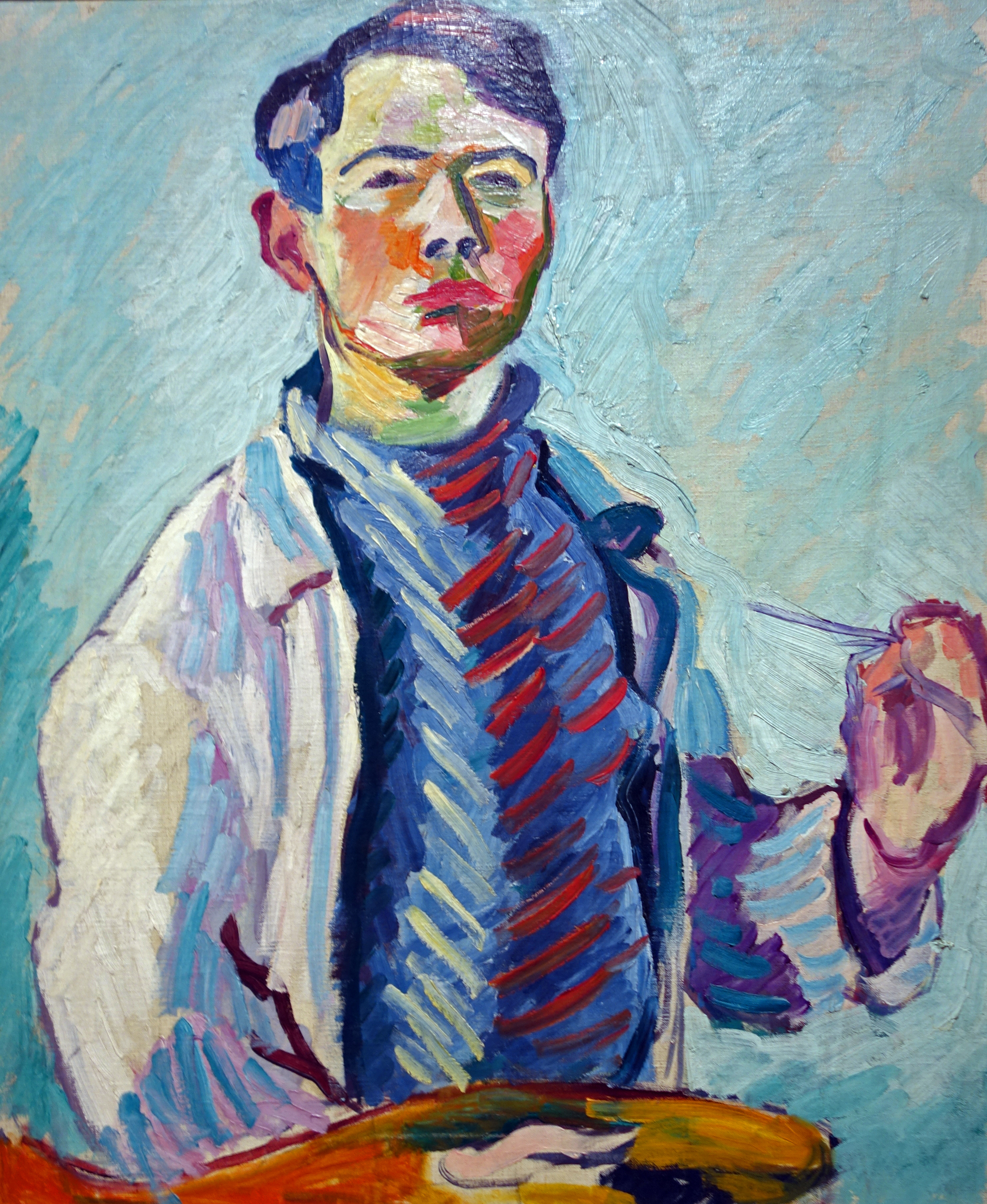 Helmuth Macke: Selbstporträt mit Palette im Museum Penzberg; um 1910/11. Öl auf Leinwand, 56 x 46 cm